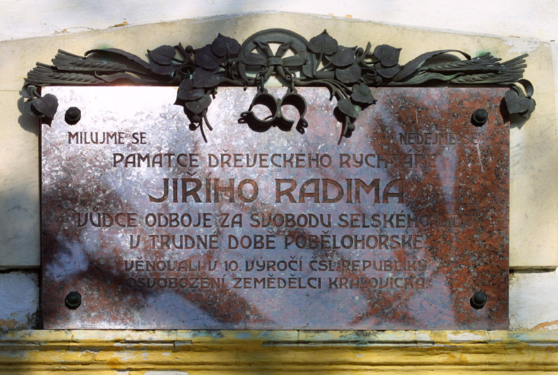 Pamětní deska Jiřímu Radimovi, rychtáři Dřevce. Datum: 30. listopadu 2005